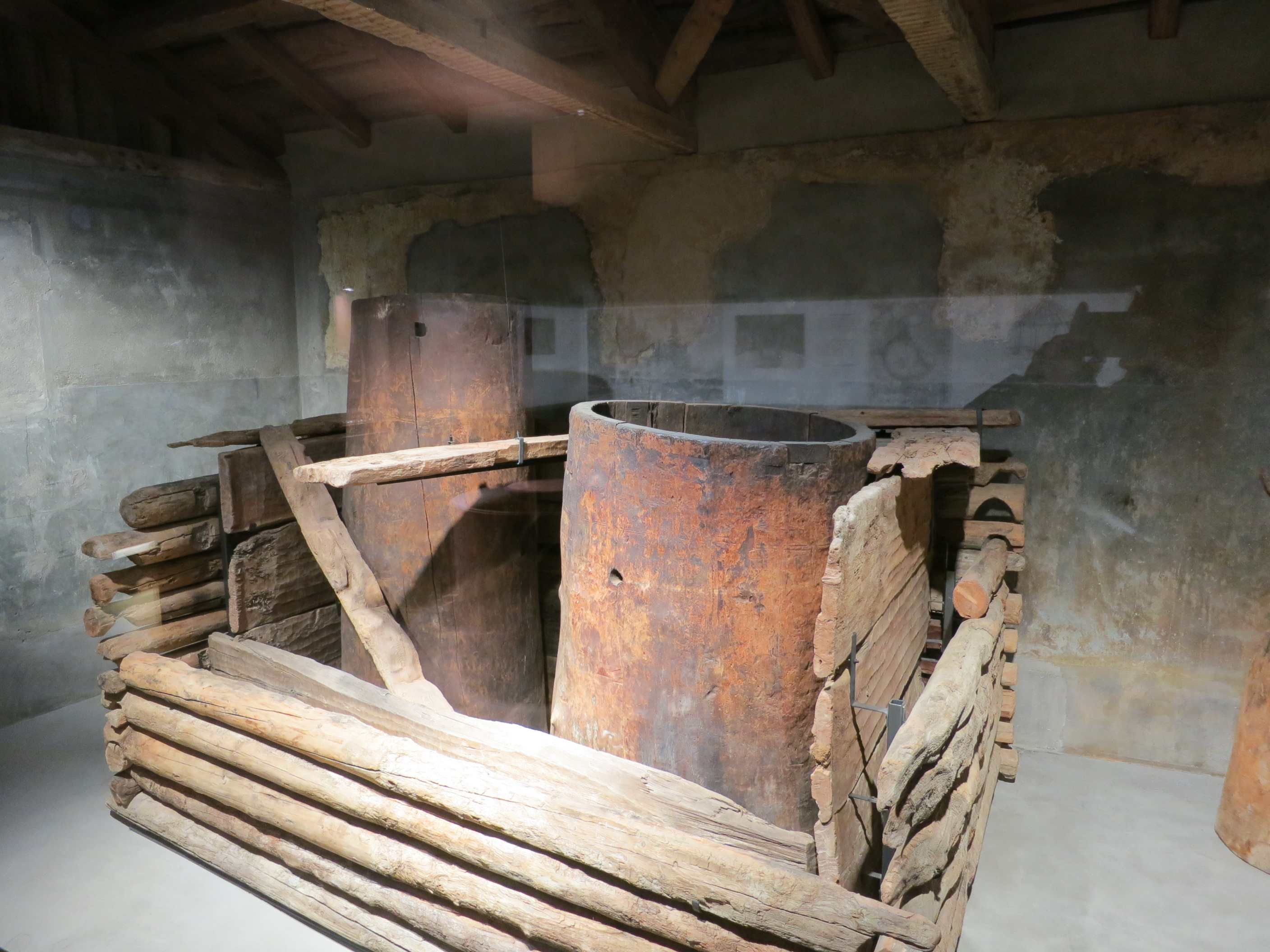 St. Mauritiusquelle, St. Moritz GR, Schweiz